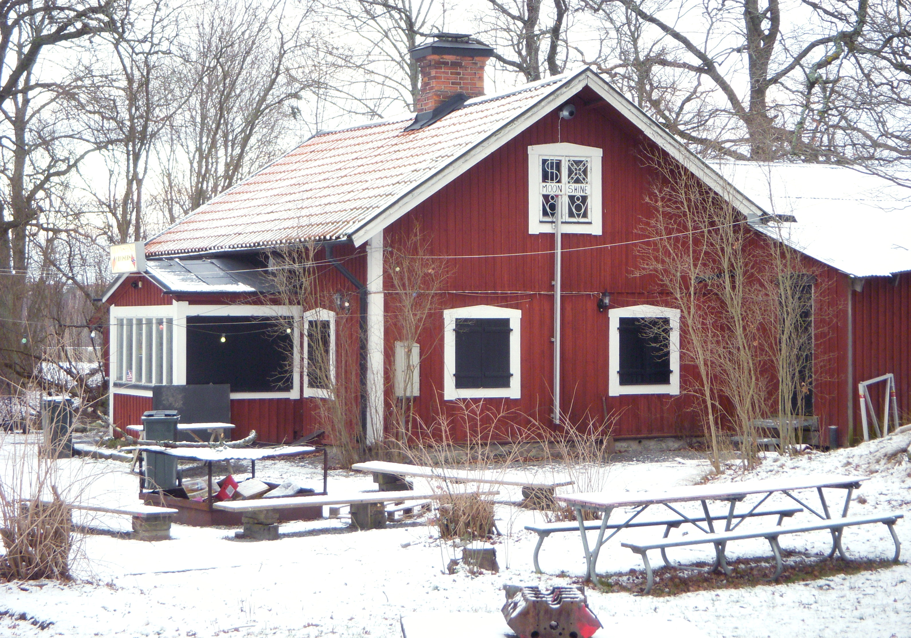 Var tidigare torp under Farsta och Hökarängen. Kallas i handlingarna för torpet Larsboda eller torpet Burmanstorp.